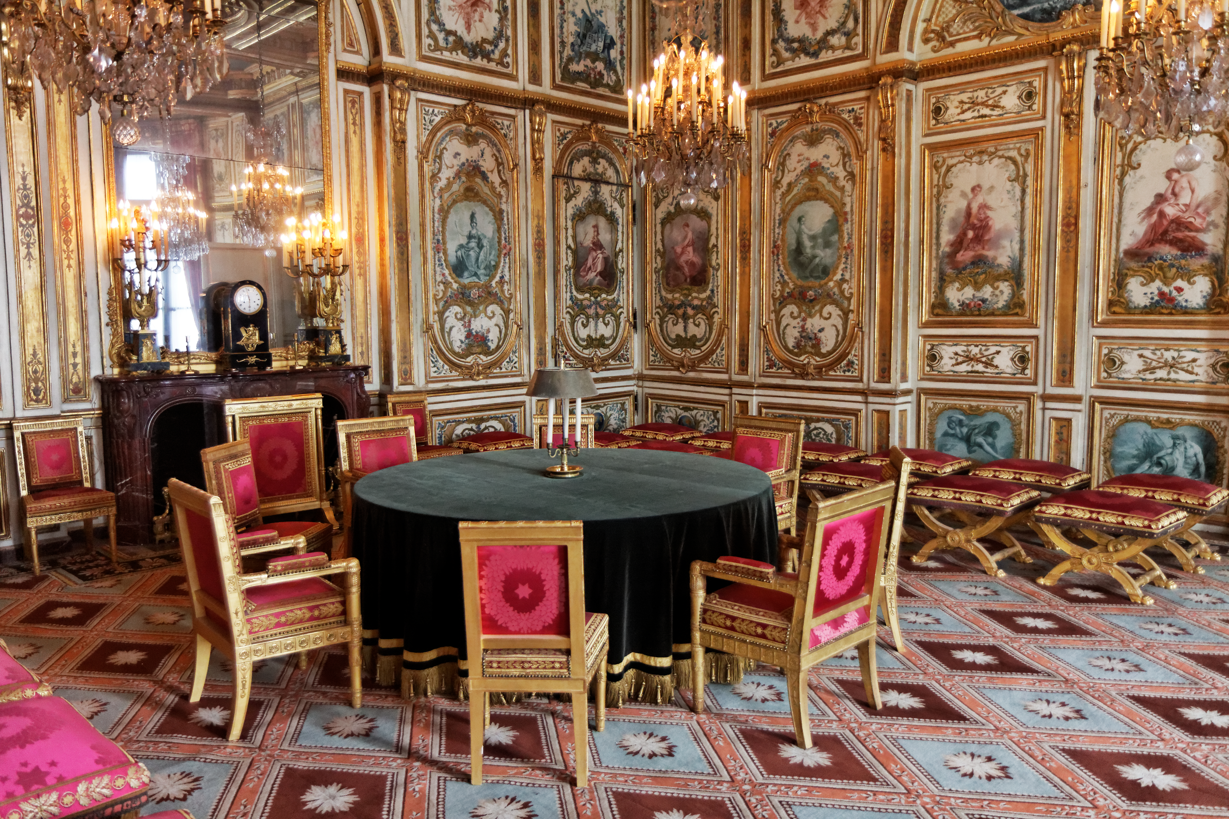 Vue de l'intérieur du château de Fontainebleau.